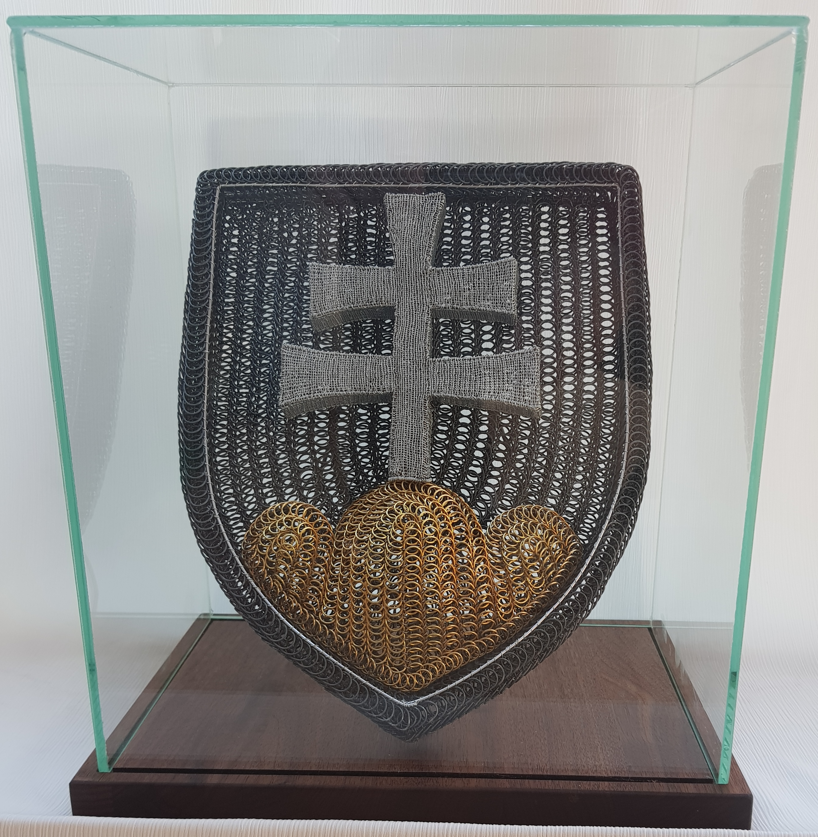 Štátny znak Slovenskej republiky, vyrobený drotárskou technikou k 25. výročiu vzniku samostatnej Slovenskej republiky.